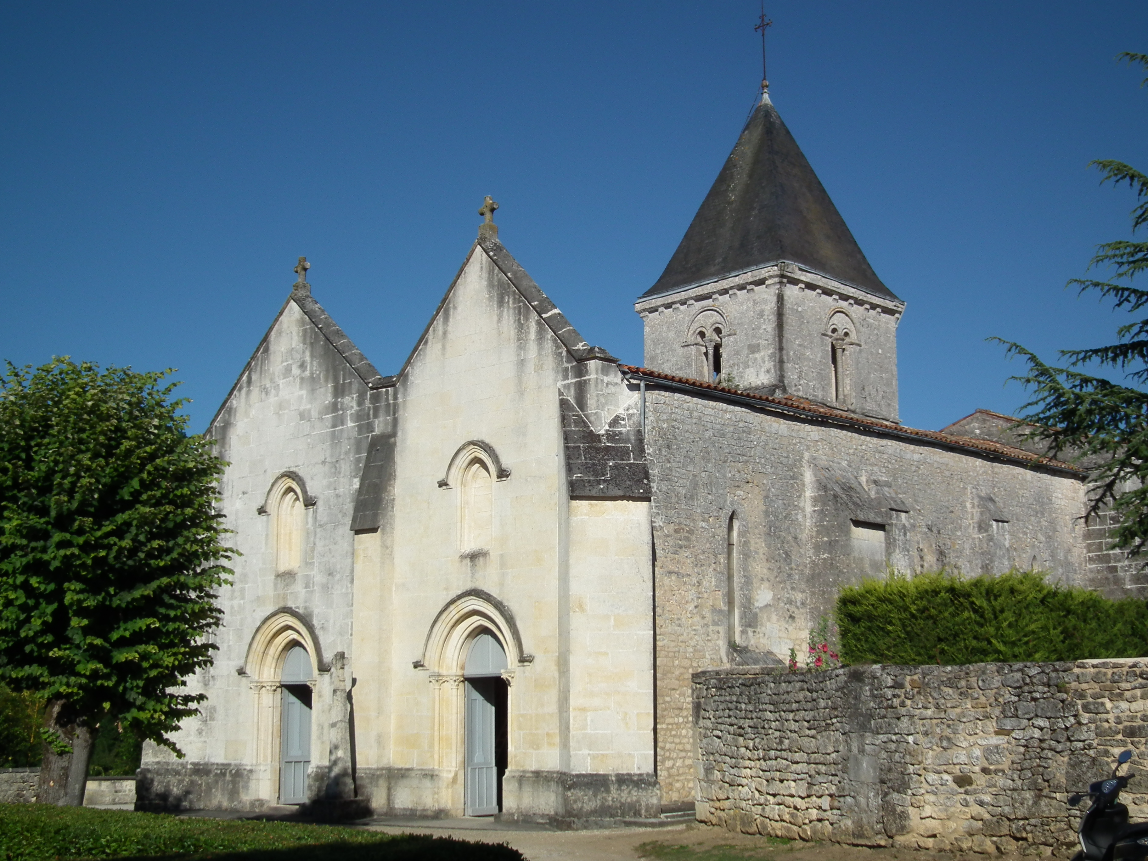 L'église de Saint-Germain-de-Lusignan